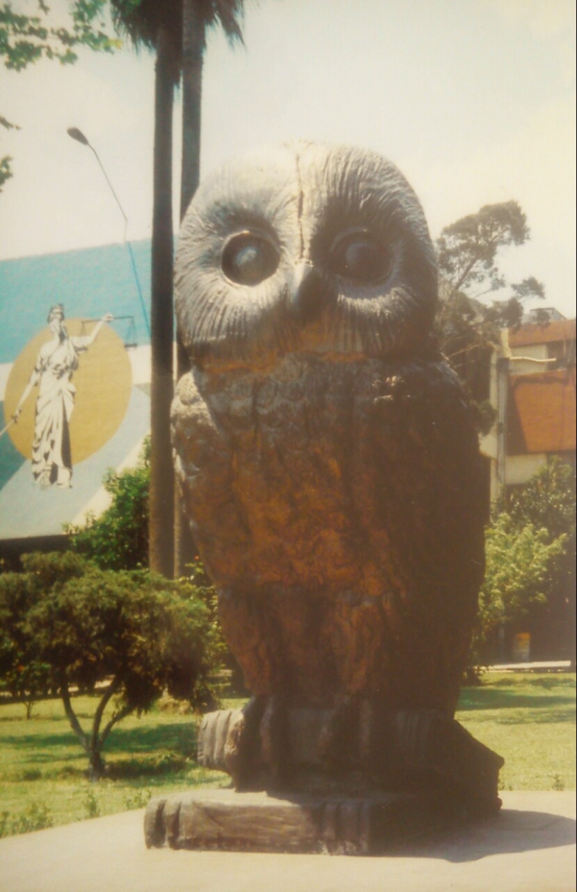 Lechuza en la Facultad de Derecho, campus de la Universidad Autónoma de Nuevo León (UANL). Escultura inaugurada por el licenciado Sócrates Rizzo García, gobernador de Nuevo León de 1991 a 1996